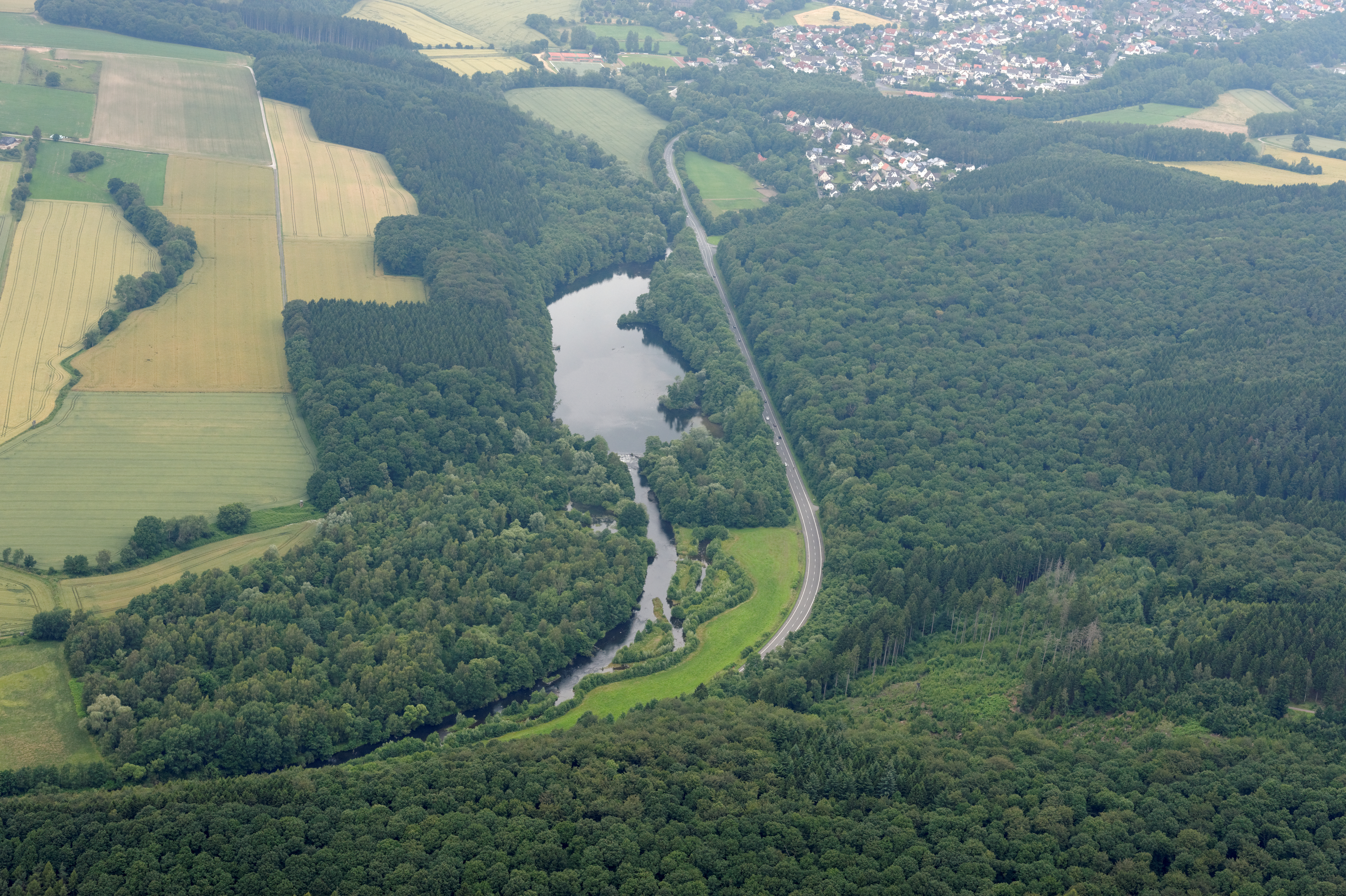 Ense: Möhnetal zwischen Niederense (oben) und Neheim mit Enser See (Relikt der Möhnekatastrophe, Naturschutzgebiet „Enser See“) (Fotoflug Sauerland Nord)